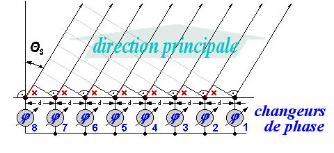 Diagramme d'opération d'un émetteur multiple où la différence de phase entre les émetteurs permet de diriger l'émission. Catégorie:Schéma de physique Licensing Image personnelle donnée libre de droits. Pierre_cb